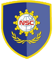 Lambang Politeknik NSC Surabaya